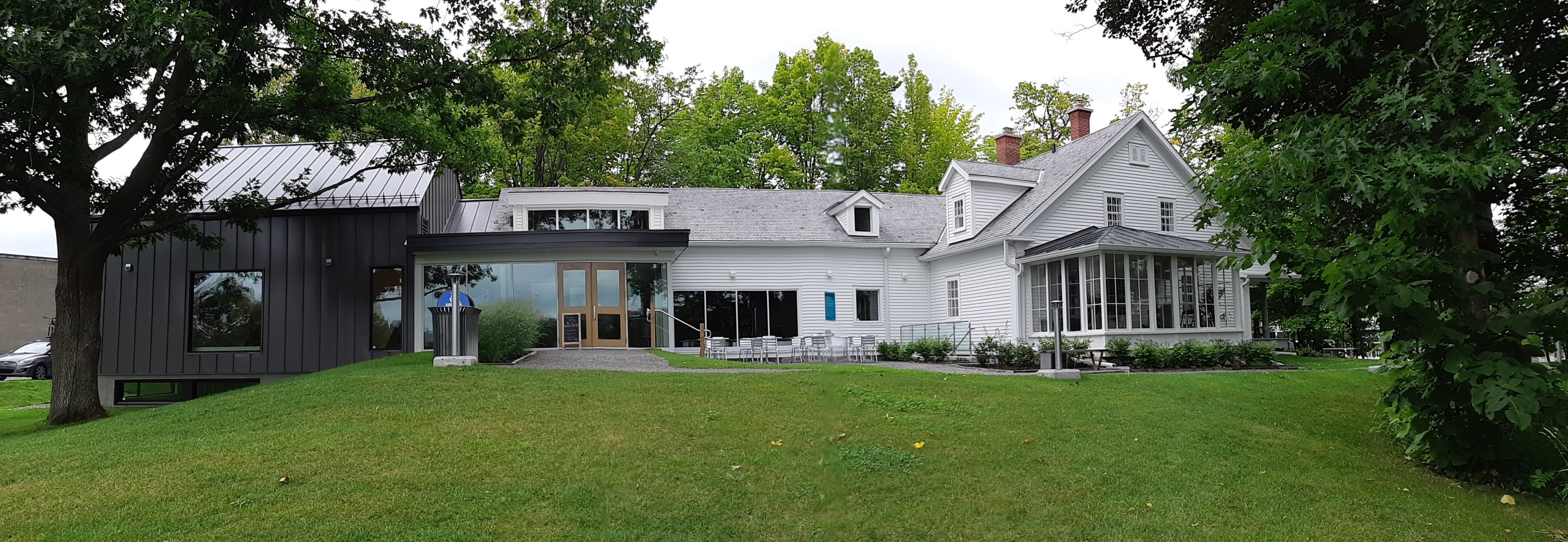 La Maison Merry avec son entrée principale en 2019. On voit l'ancienne partie (droite) et l'ancienne (gauche).